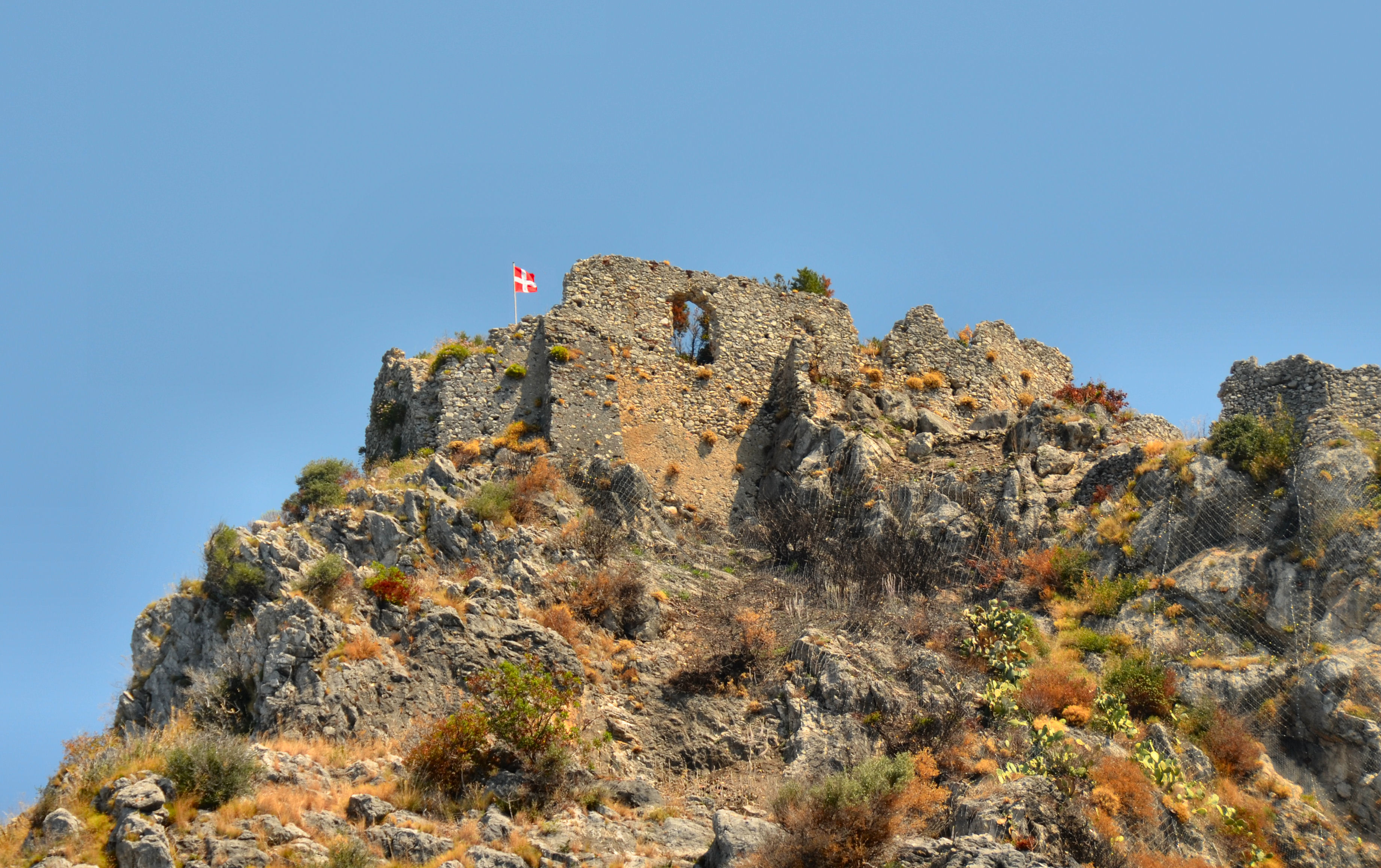 L'antico Castello di Castrocucco sormontato da una bandiera rossa con croce bianca al centro.